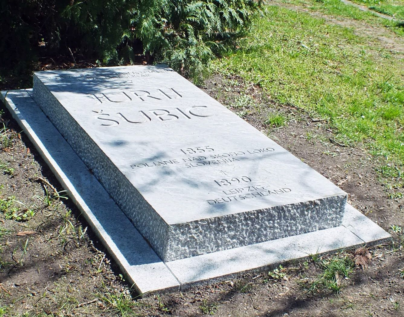 Gedenkstein auf dem Leipziger Südfriedhof für den slowenischen Maler Jurij Šubic, der in Leipzig gestorben ist